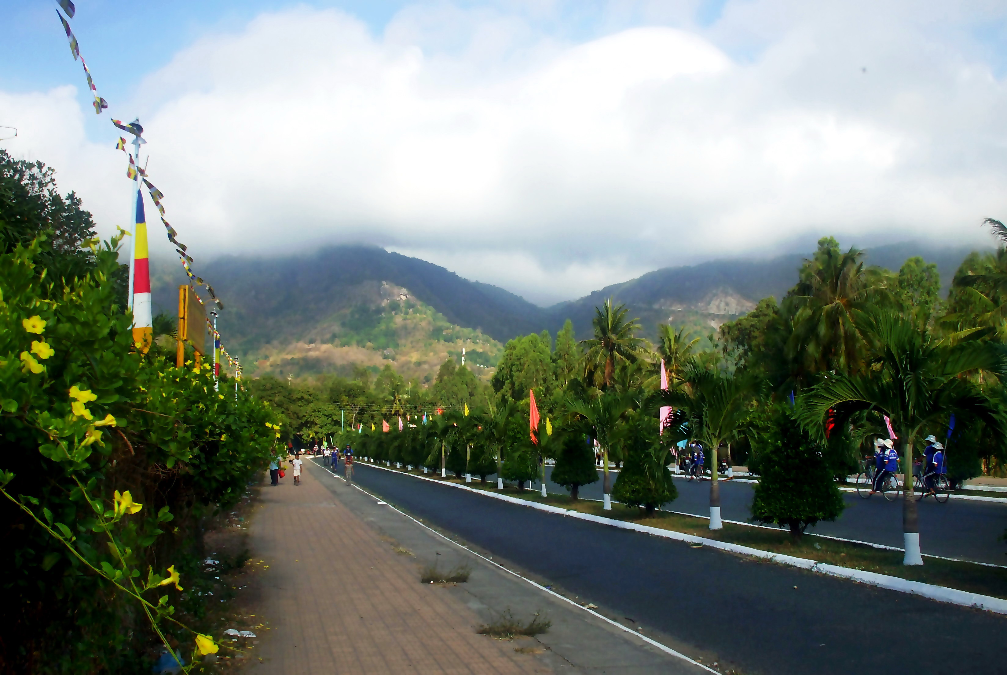 Đường vào khu du lịch Lâm viên Núi Cấm, thuộc xã An Hảo, huyện Tịnh Biên, An Giang, Việt Nam.